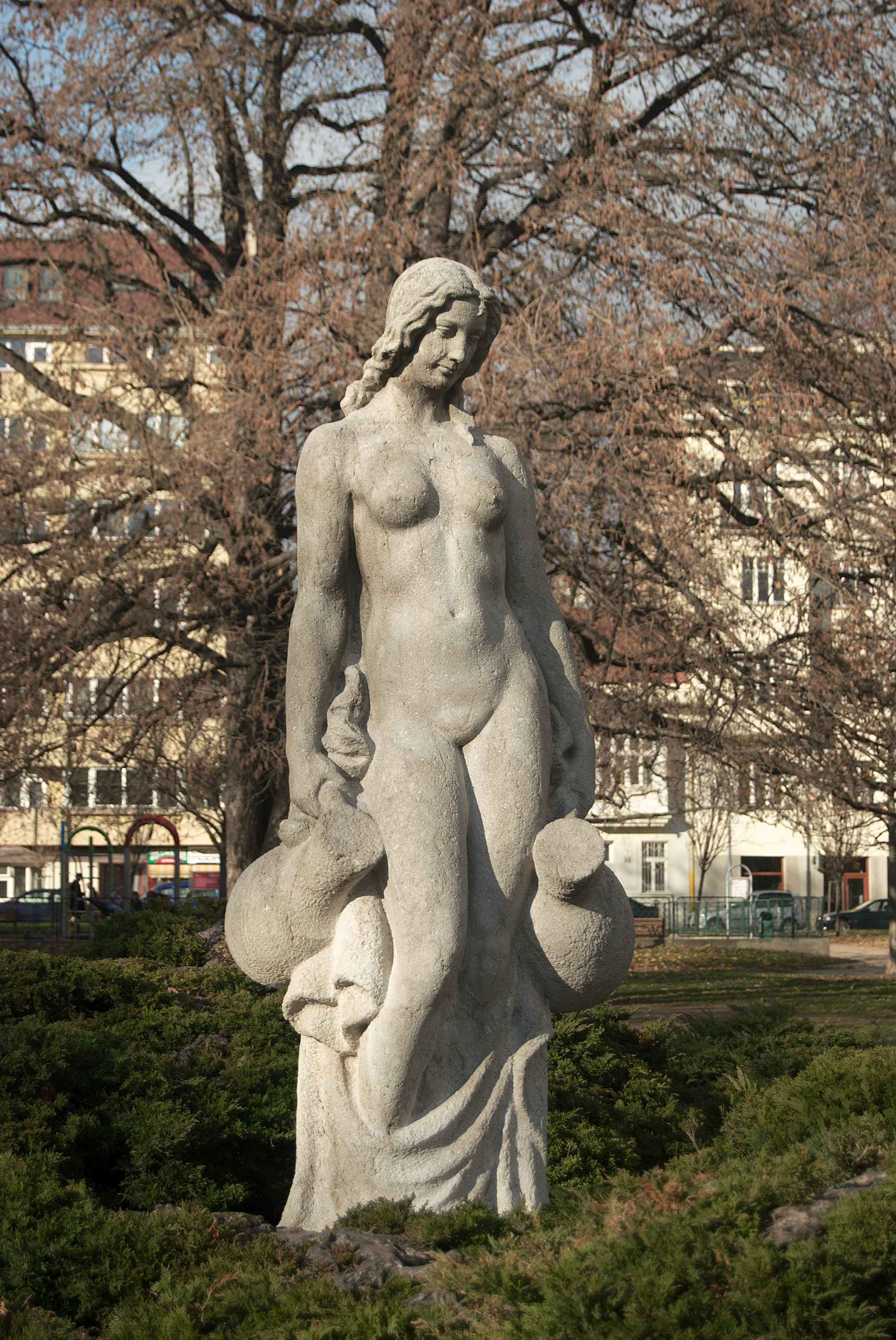 Brno-Veveří - socha v parku na Obilním Trhu